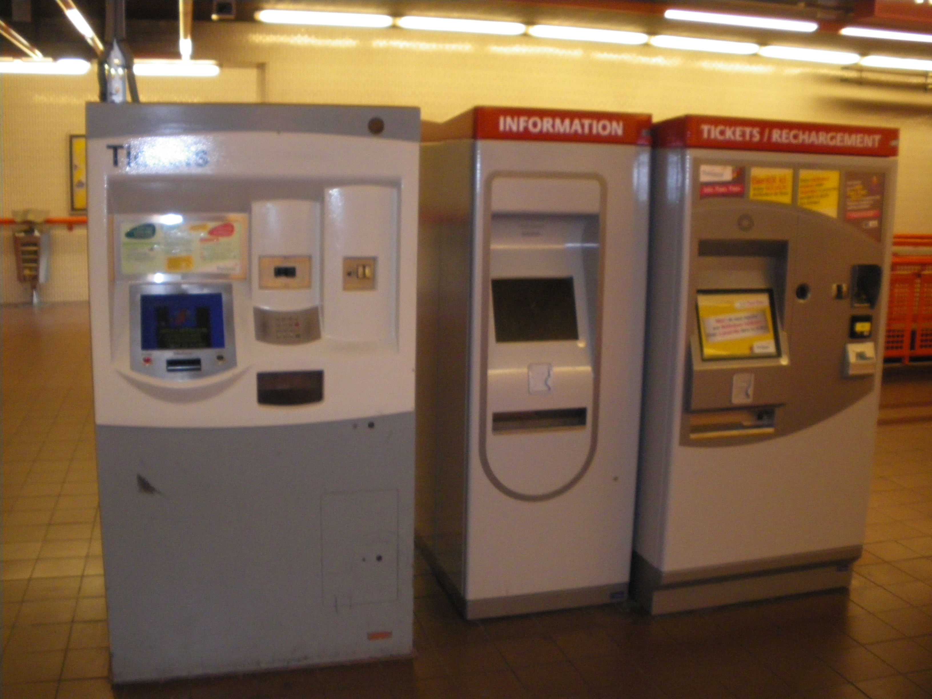 Vue des distributeurs de tickets de la station de métro "Marbrerie" de la ligne 1 du métro de Lille et située dans le quartier de Fives à Lille.